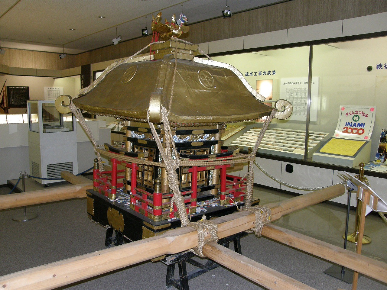 tenma-jinja-天満神社-稲美-神輿 tenma-jinja-天満神社-稲美-神輿